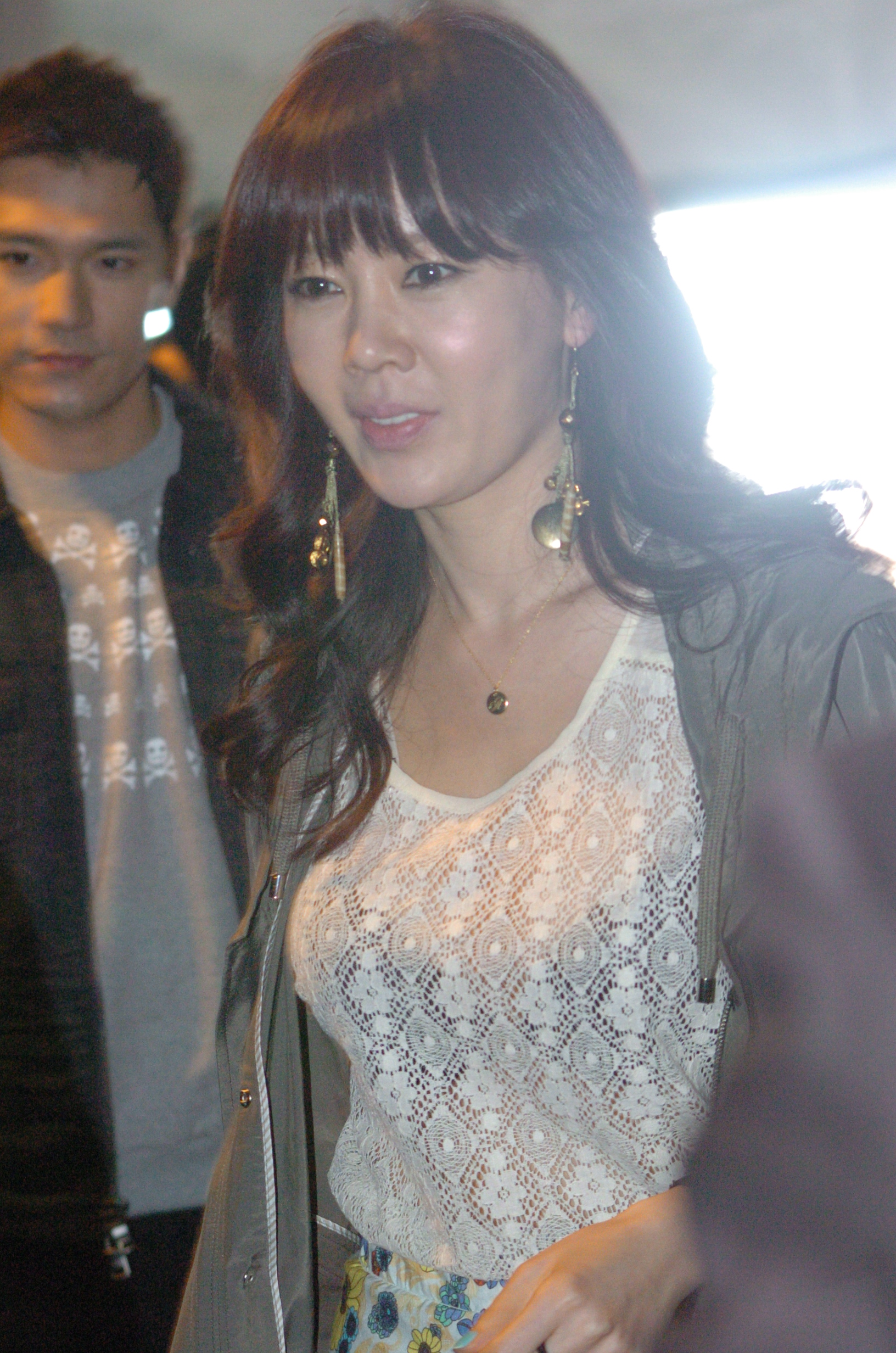 2012 가을겨울서울패션위크